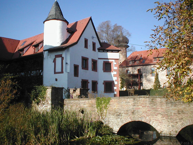 Wassergraben und Steinbrücke zum Hauptgebäude des Schlosses in Mosbach-Lohrbach, Baden-Württemberg, Deutschland